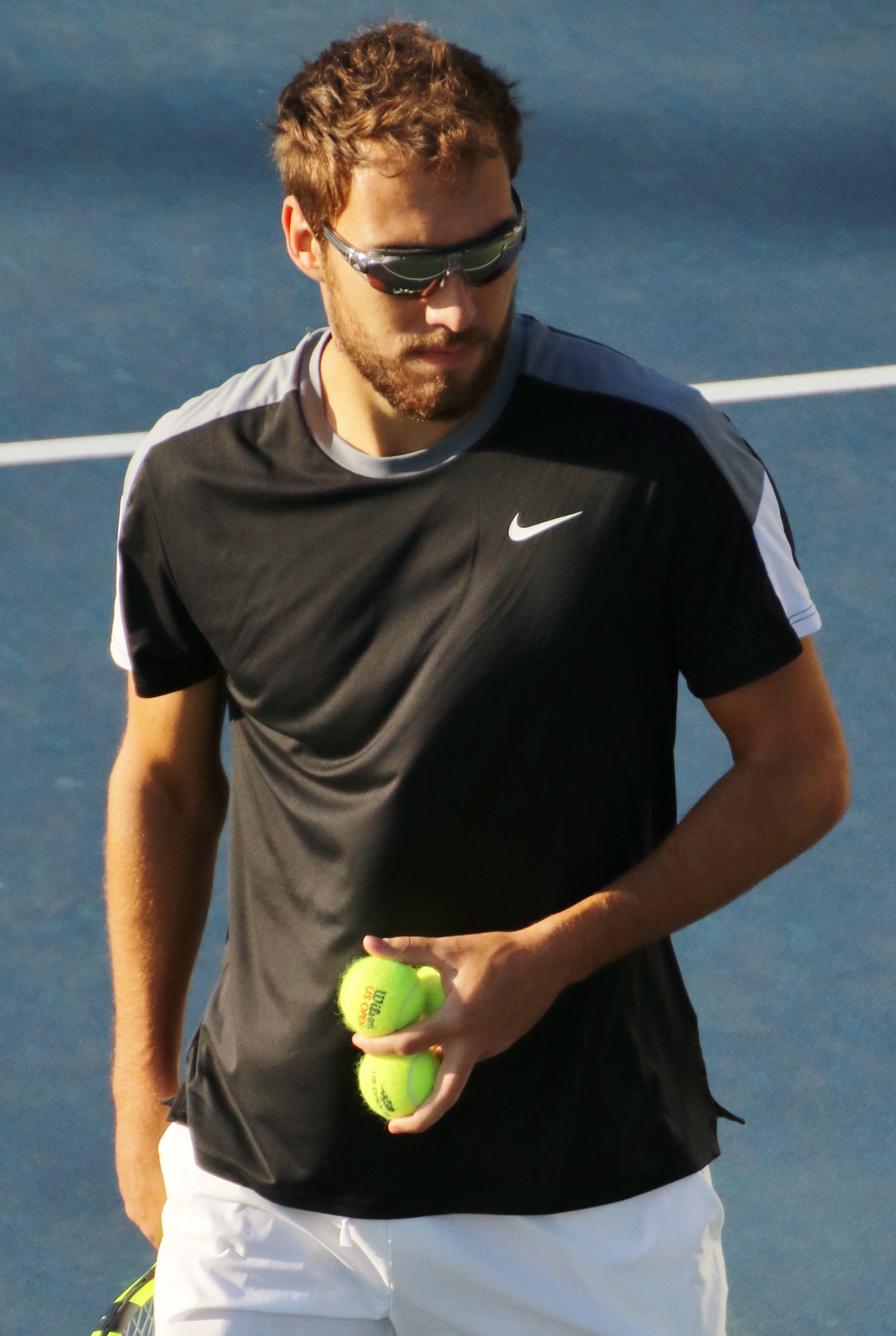 Janowicz US16 (1)